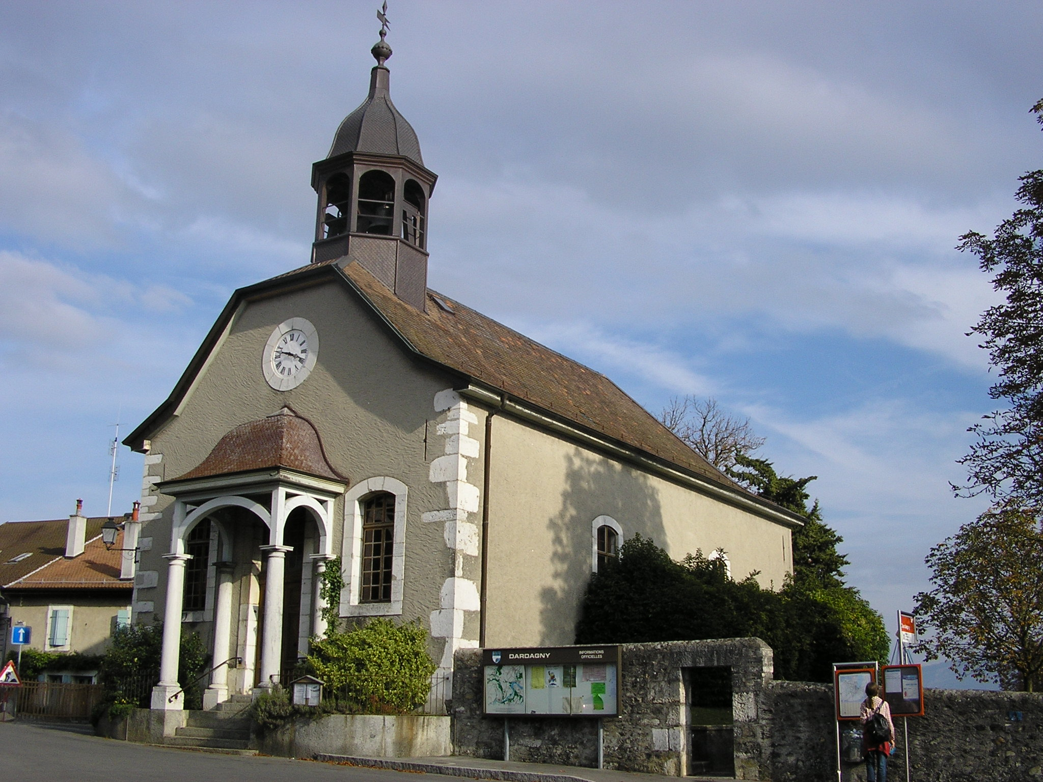 Temple de Dardagny